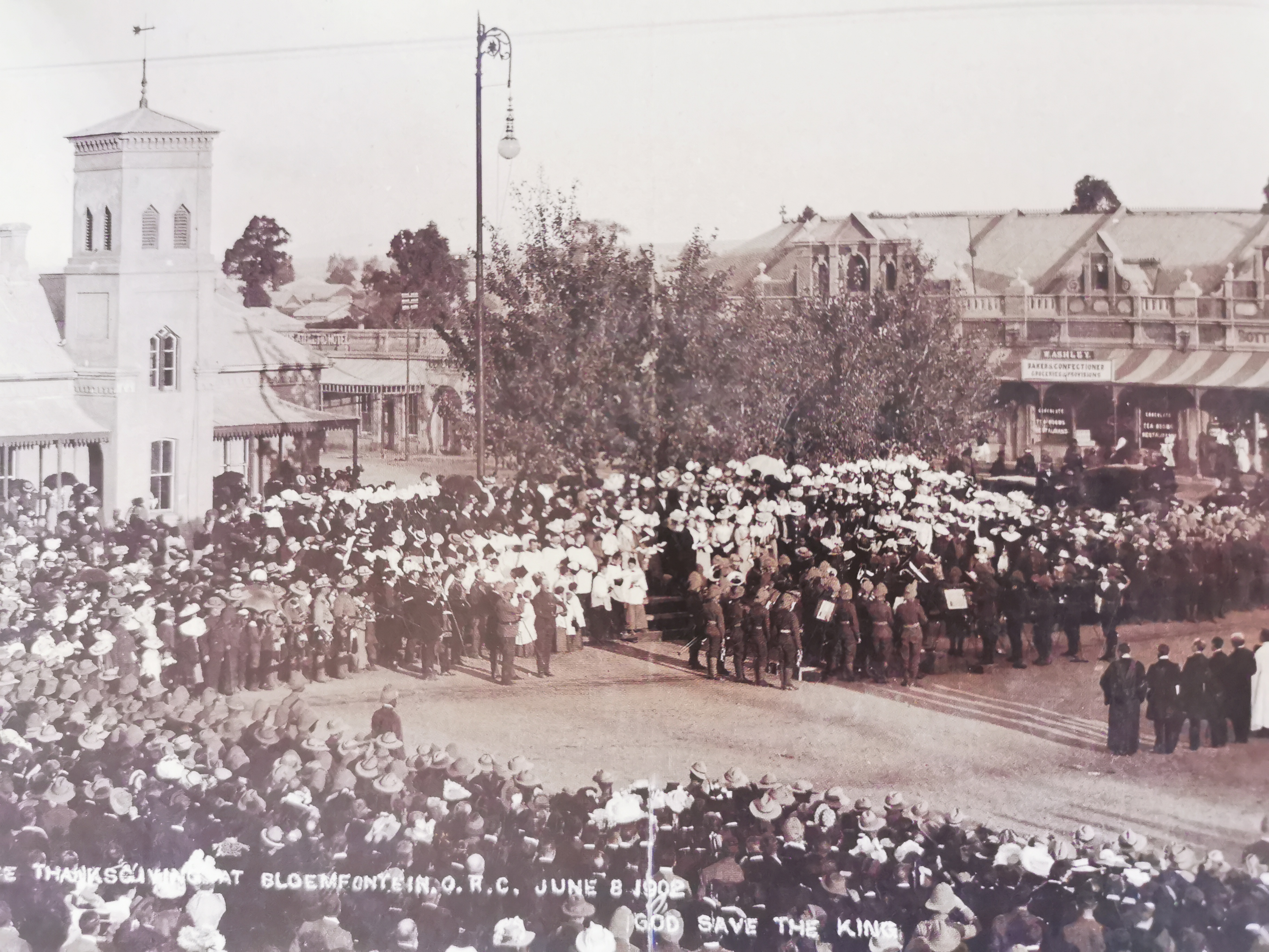 Dankdag vir die vrede op Hoffmanplein in Bloemfontein op 8 Junie 1902. Foto: Oorlogsmuseum van die Boererepublieke